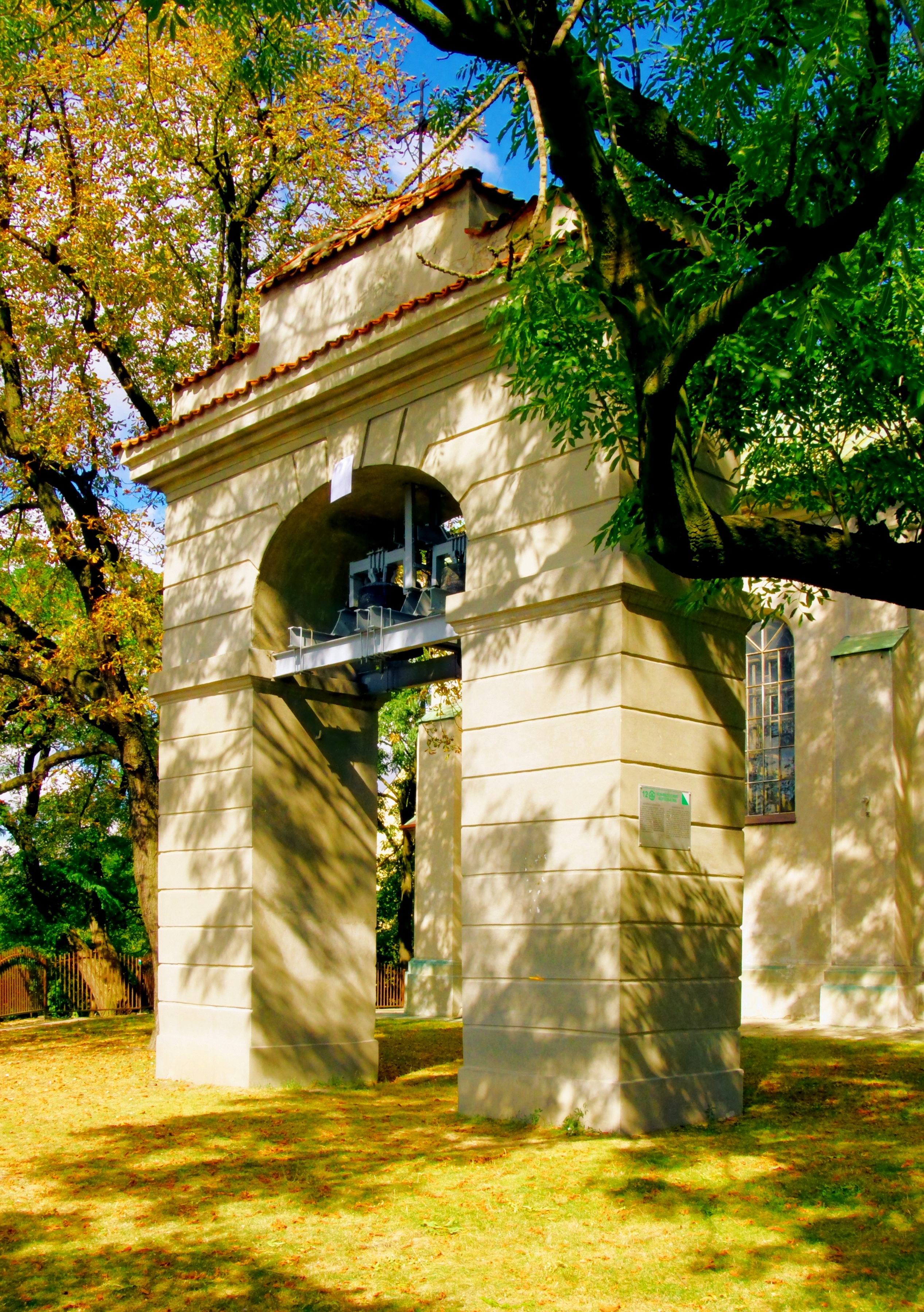 Dzwonnica kościoła parafialnego p.w. Św. Mikołaja na Czwartku